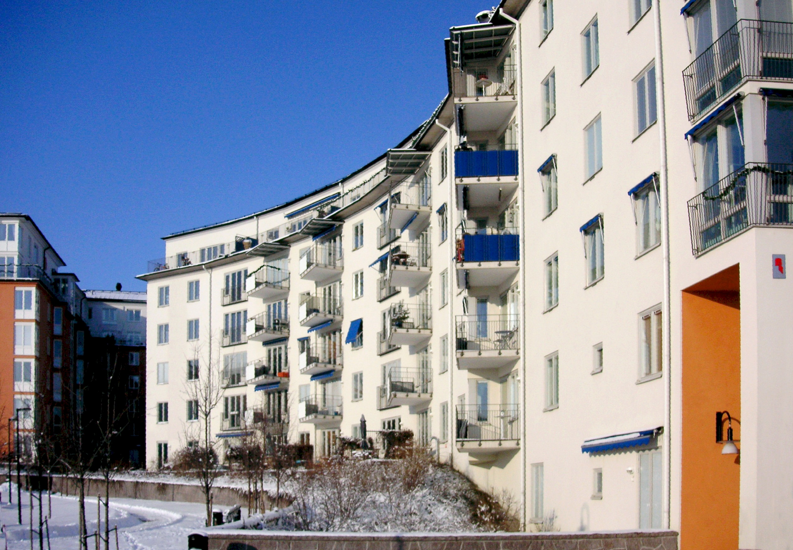 Norra Hammarby sjöstad i Stockholm, fastighet Nektarinen 7 arkitekt Brunnberg & Forshed arkitektkontor.